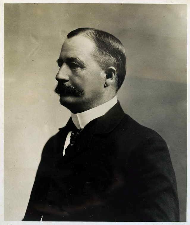 Retrato en su madurez de Carlos Thays.